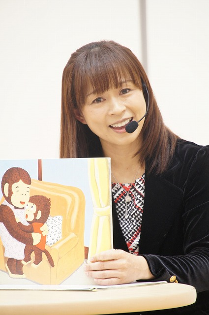 ゆめタウン徳島にて紙芝居読み聞かせ